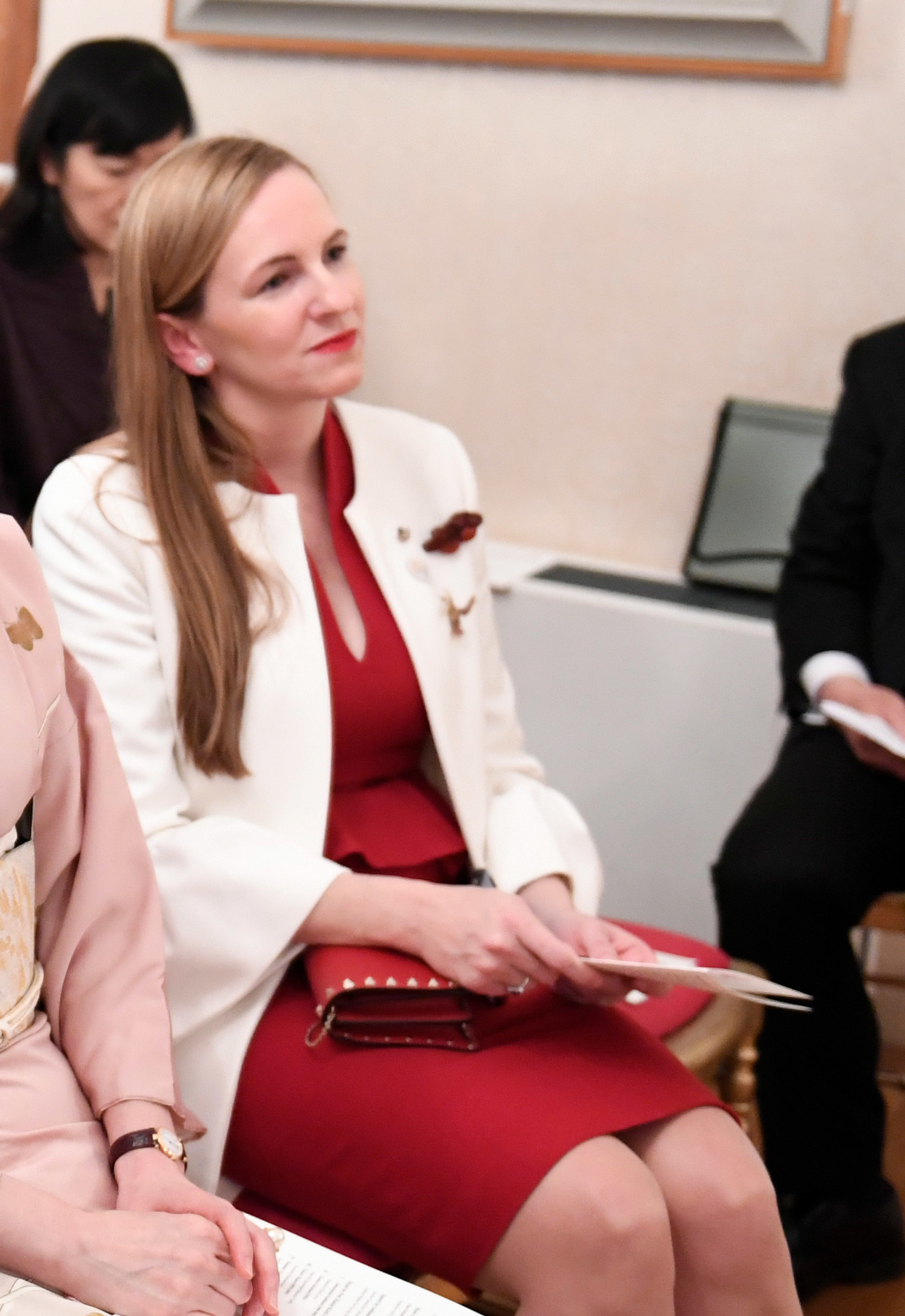 Wien am 23. Jänner 2019, Eröffnungsveranstaltung aus Anlass des Jubiläumsjahres "150 Jahre Freundschaft Österreich-Japan" Foto: Mahmoud